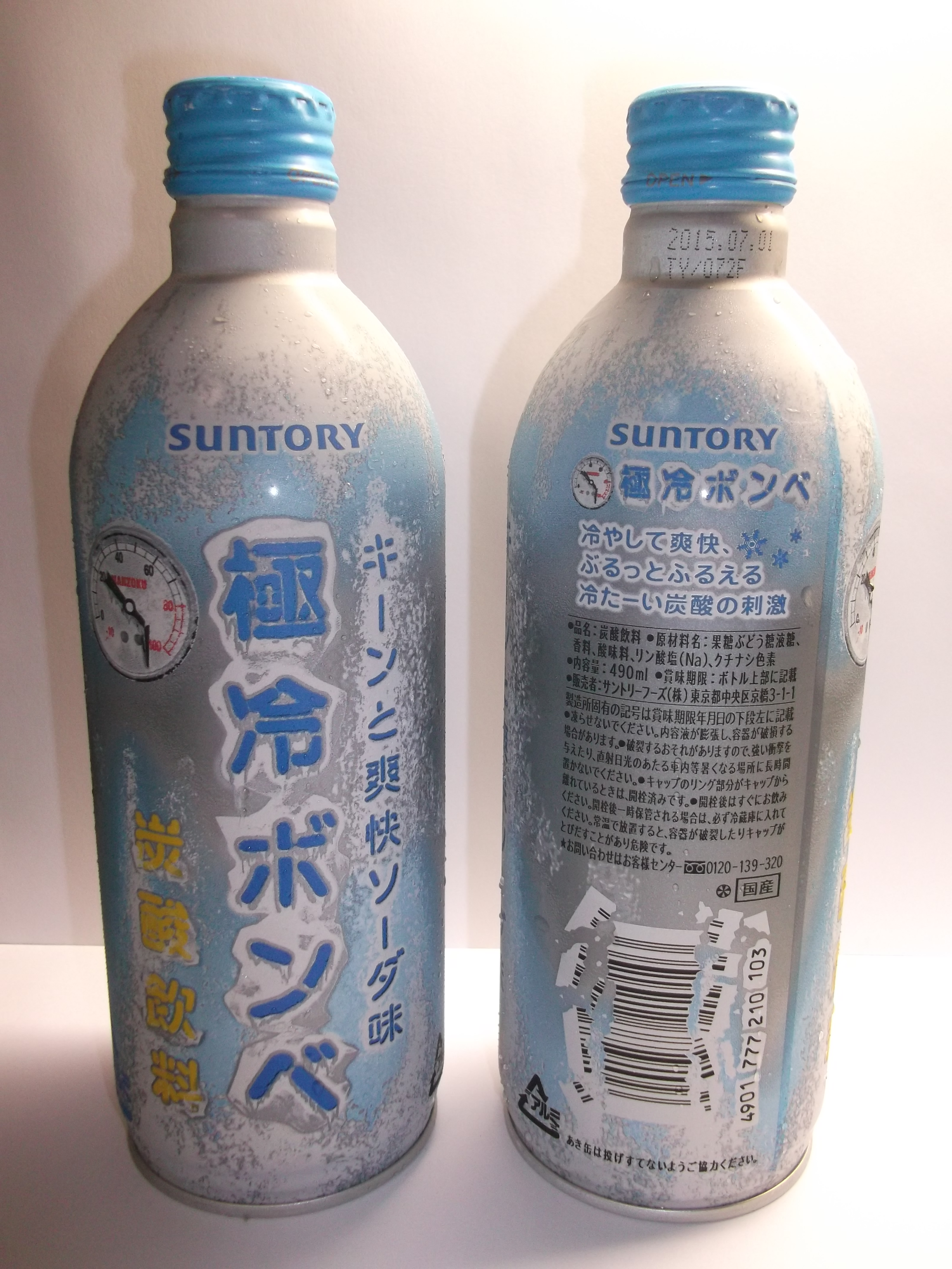 サントリー社製品ファミリーマート販売「極冷ボンベ」2014年版パッケージ